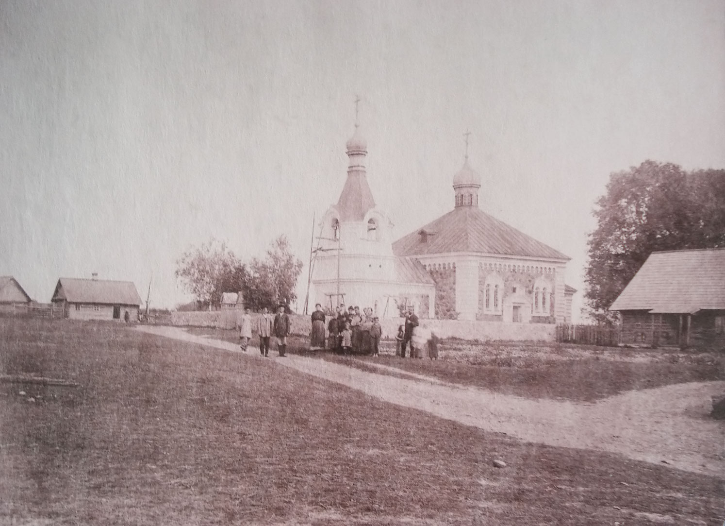 Беларуская (тарашкевіца): Орля (Orla). Царква-мураўёўка